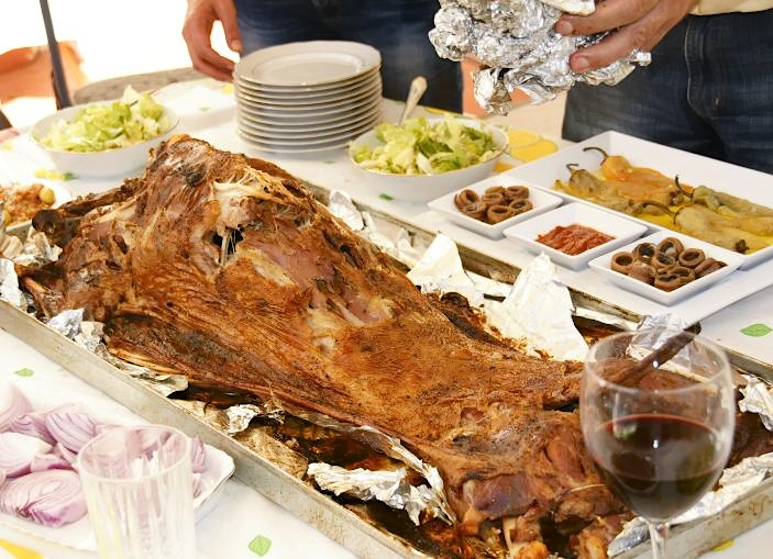 Fertig gegrilltes und angerichtetes Mechoui (Lamm) – vorm Zerteilen